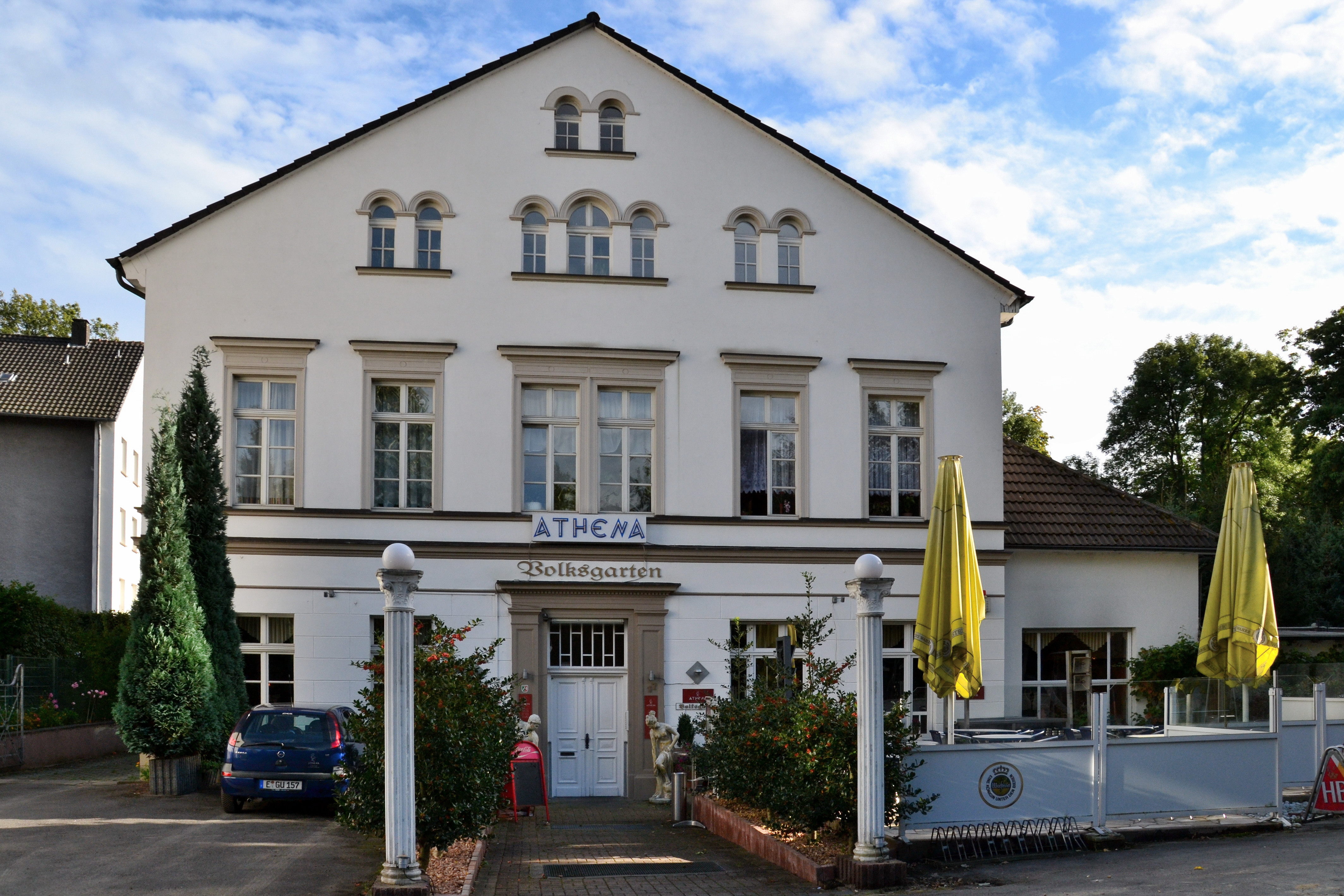 Wohn- und Gaststättenhaus in Essen-Leithe, unter DenkmalschutzThis is a photograph of an architectural monument.